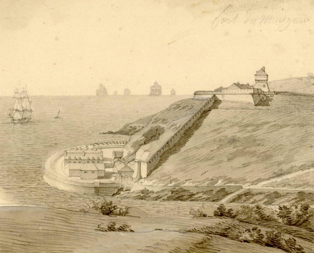 Fort du Mengant schema